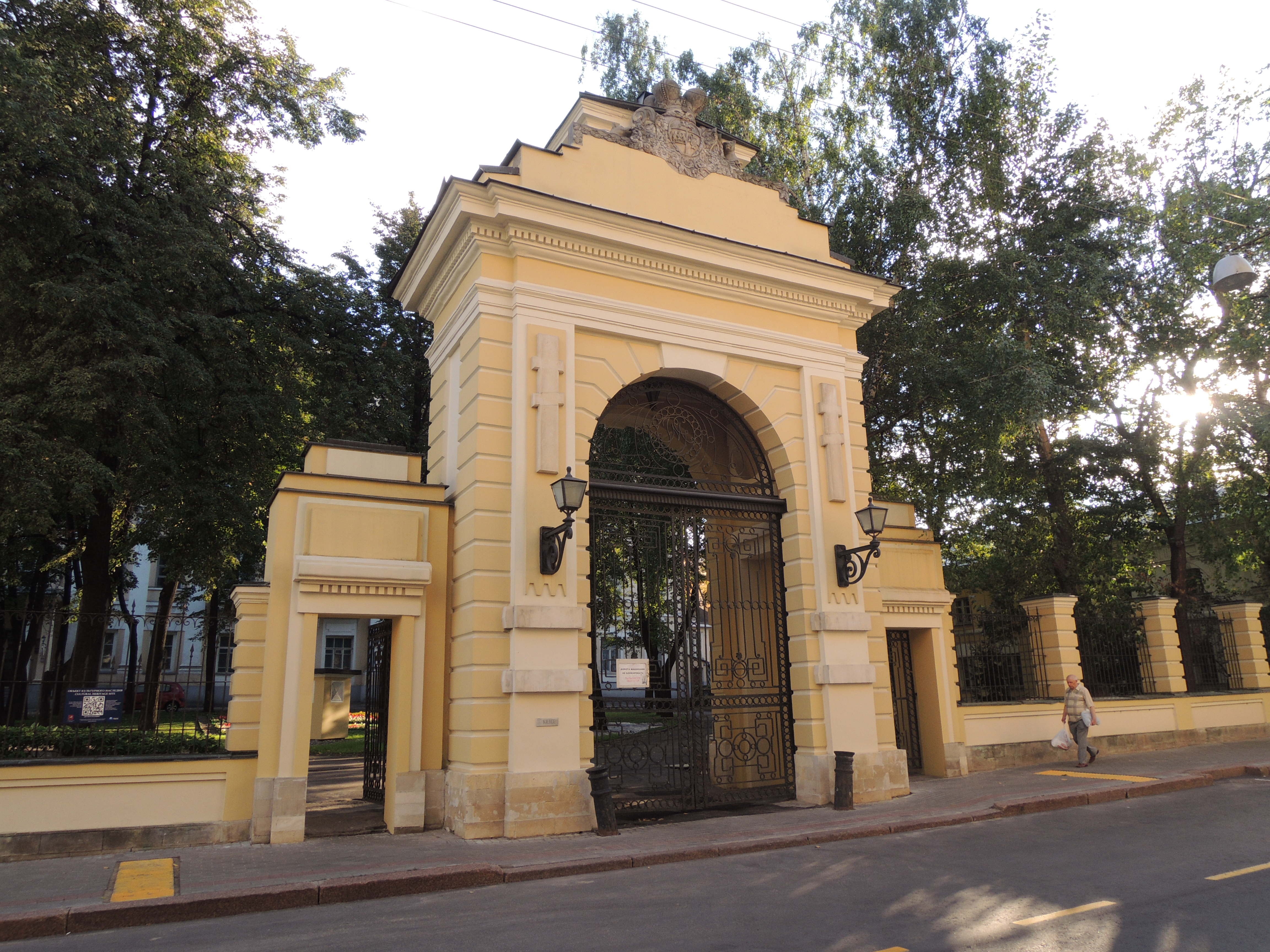 Усадьба Голицыных в Знаменском переулке